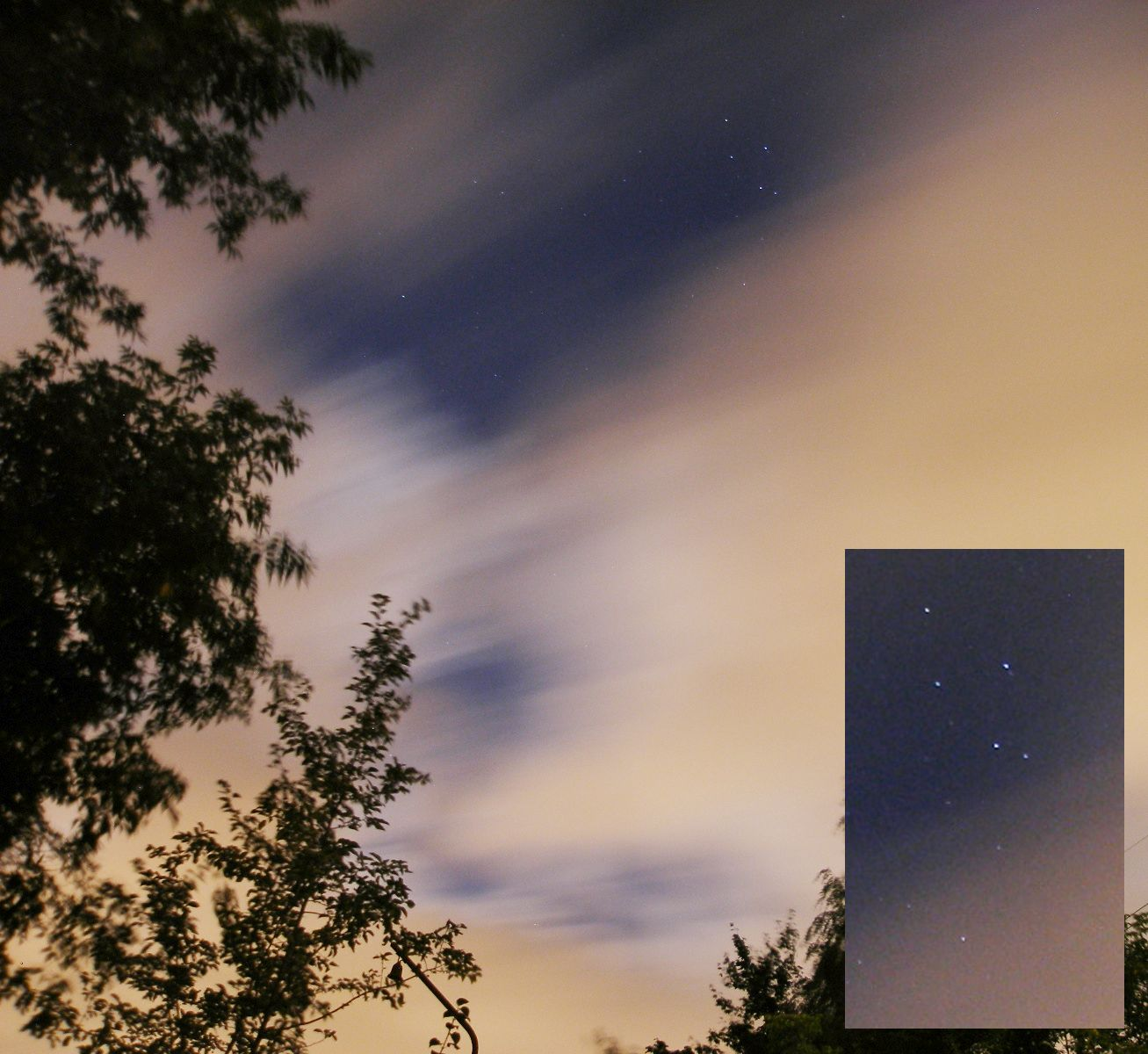 Delphinus constellation. Delfīna zvaigznājs.